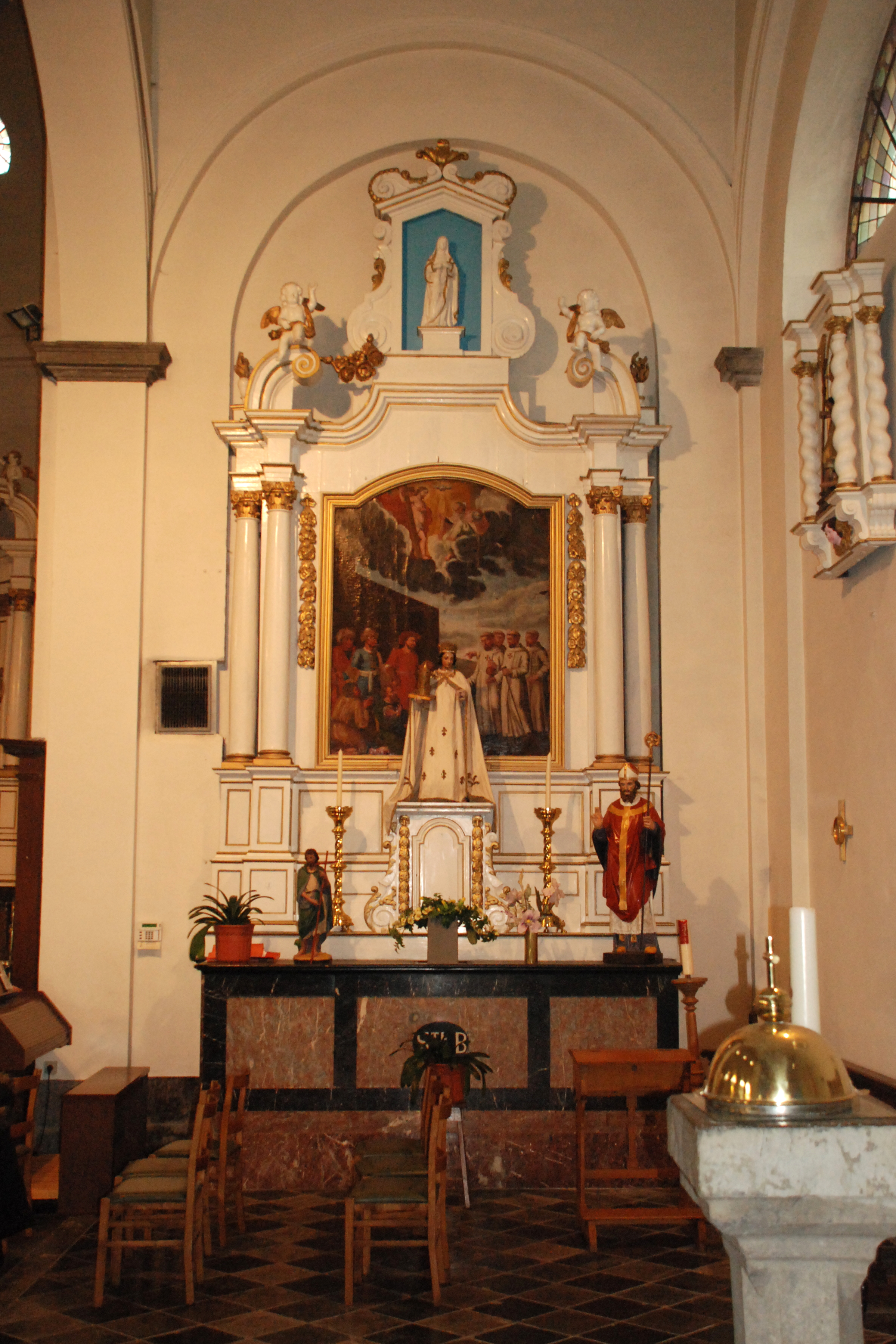 Belgique - Province de Namur - Viroinval - Nismes - église Saint-Lambert (1829)